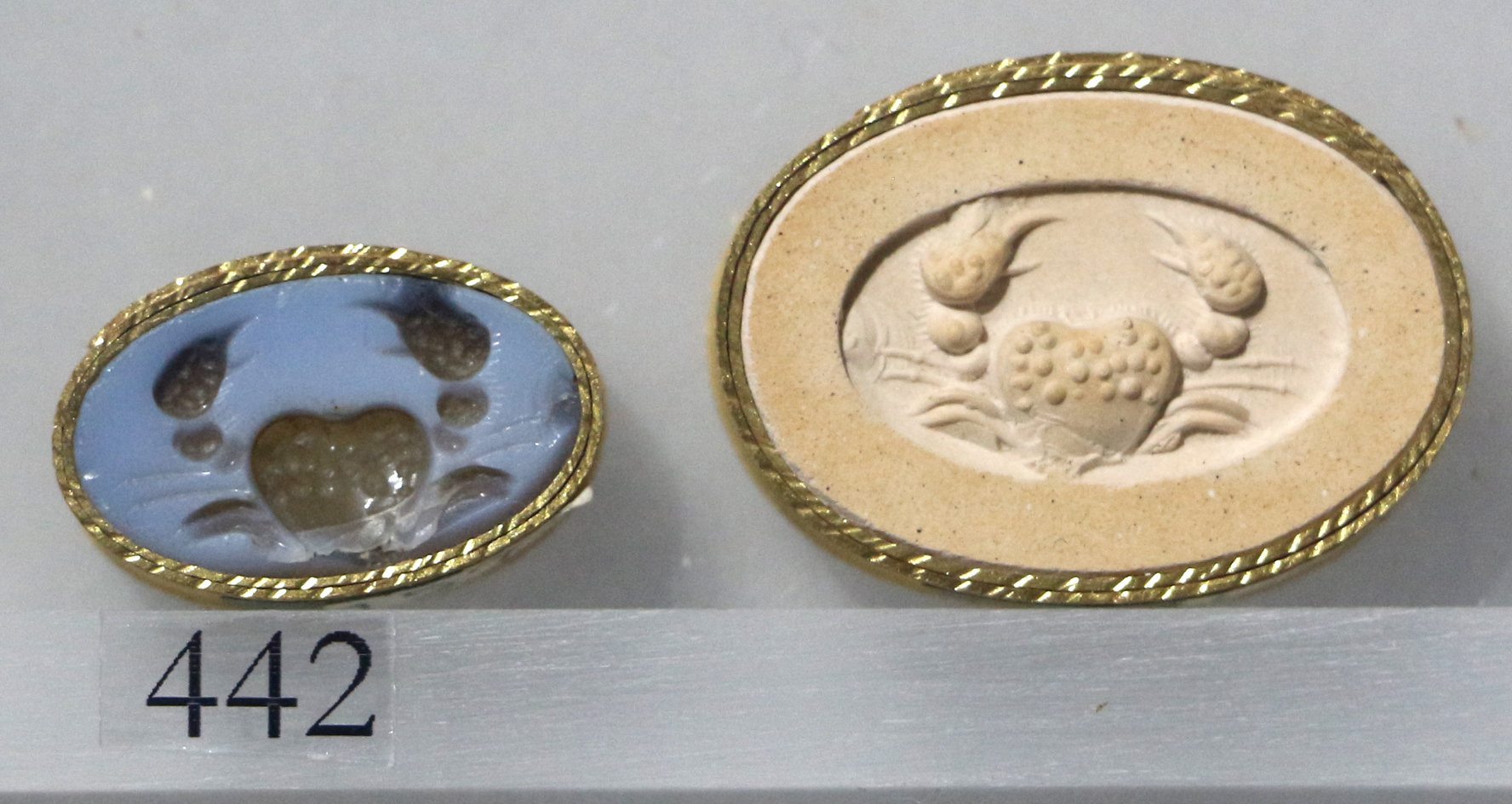 Museo Archeologico Nazionale dell'Umbria This is a photo of a monument which is part of cultural heritage of Italy.